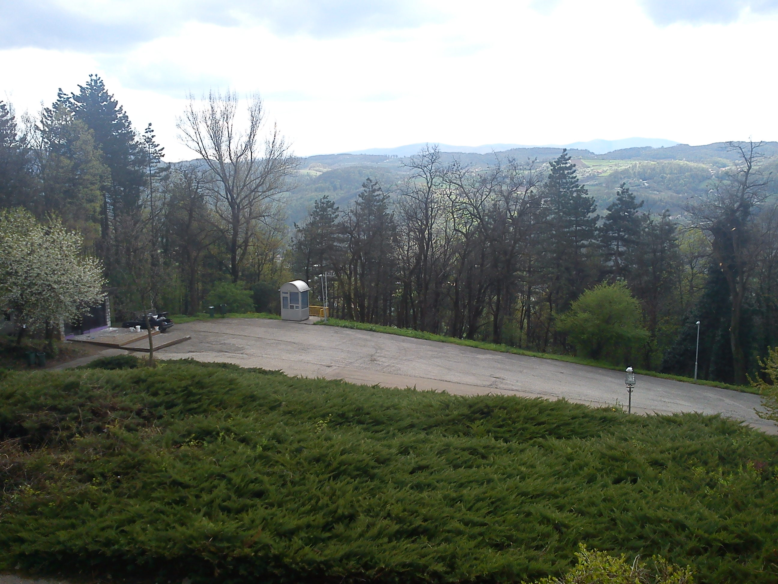 бањалучко излетиште